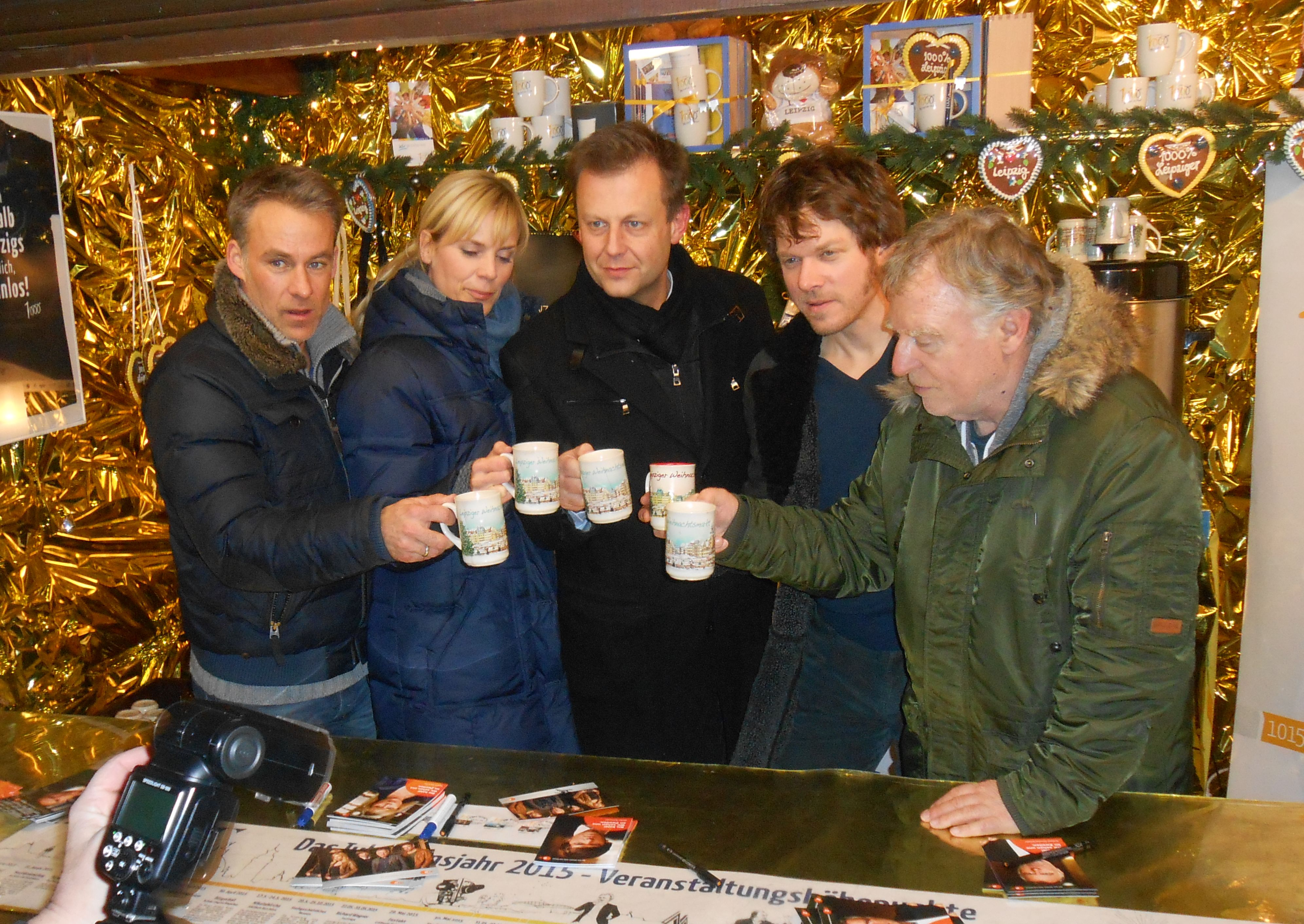 Die Darsteller der ZDF-Krimiserie "SOKO Leipzig" (Marco Girnth, Melanie Marschke, Steffen Schroeder, Andreas Schmidt-Schaller) am "1000 Jahre Leipzig" Stand auf dem Leipziger Weihnachtsmarkt 2014.